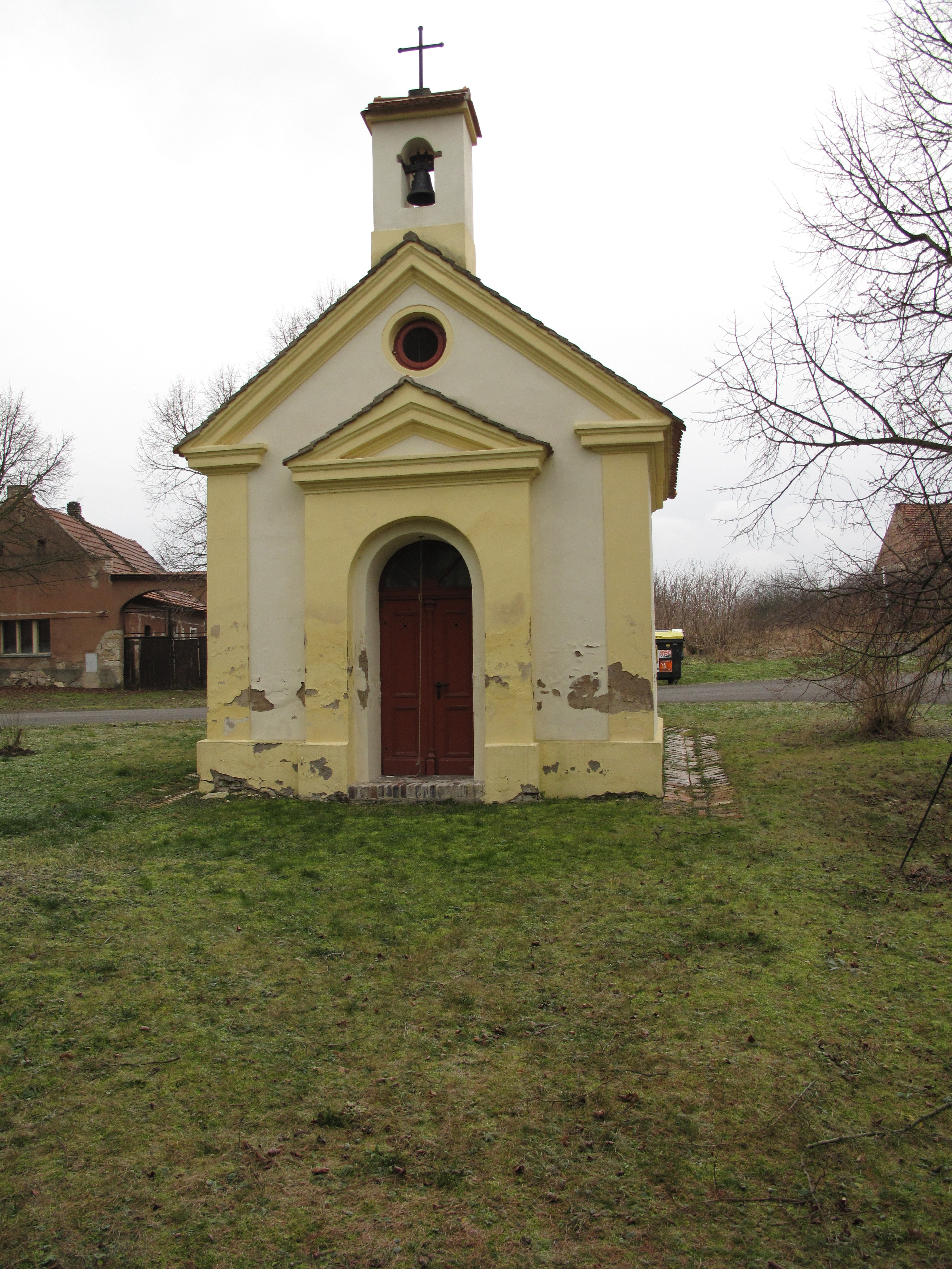 Kaplička v Lukohořanech. Okres Litoměřice, Česká republika.